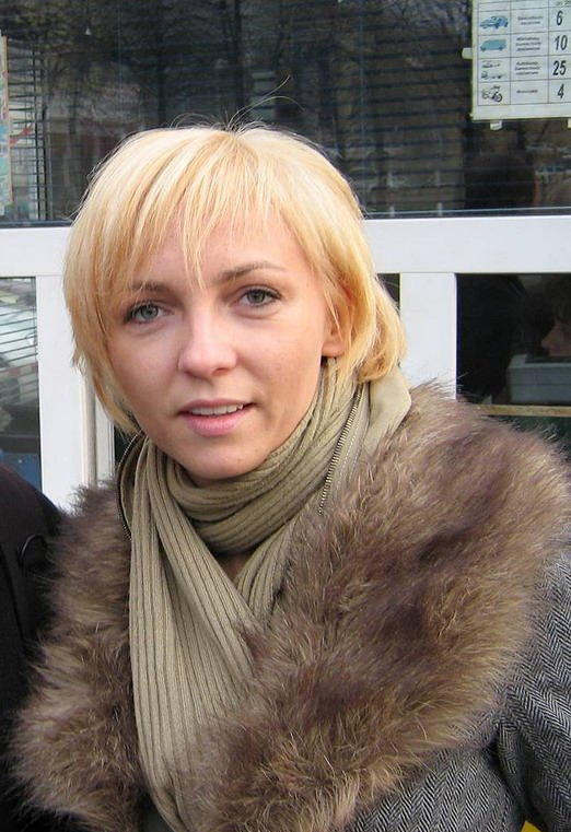 Anna Wyszkoni - (ur. 21 lipca 1980 roku w Tworkowie, powiat raciborski na Górnym Śląsku) - piosenkarka, autorka tekstów